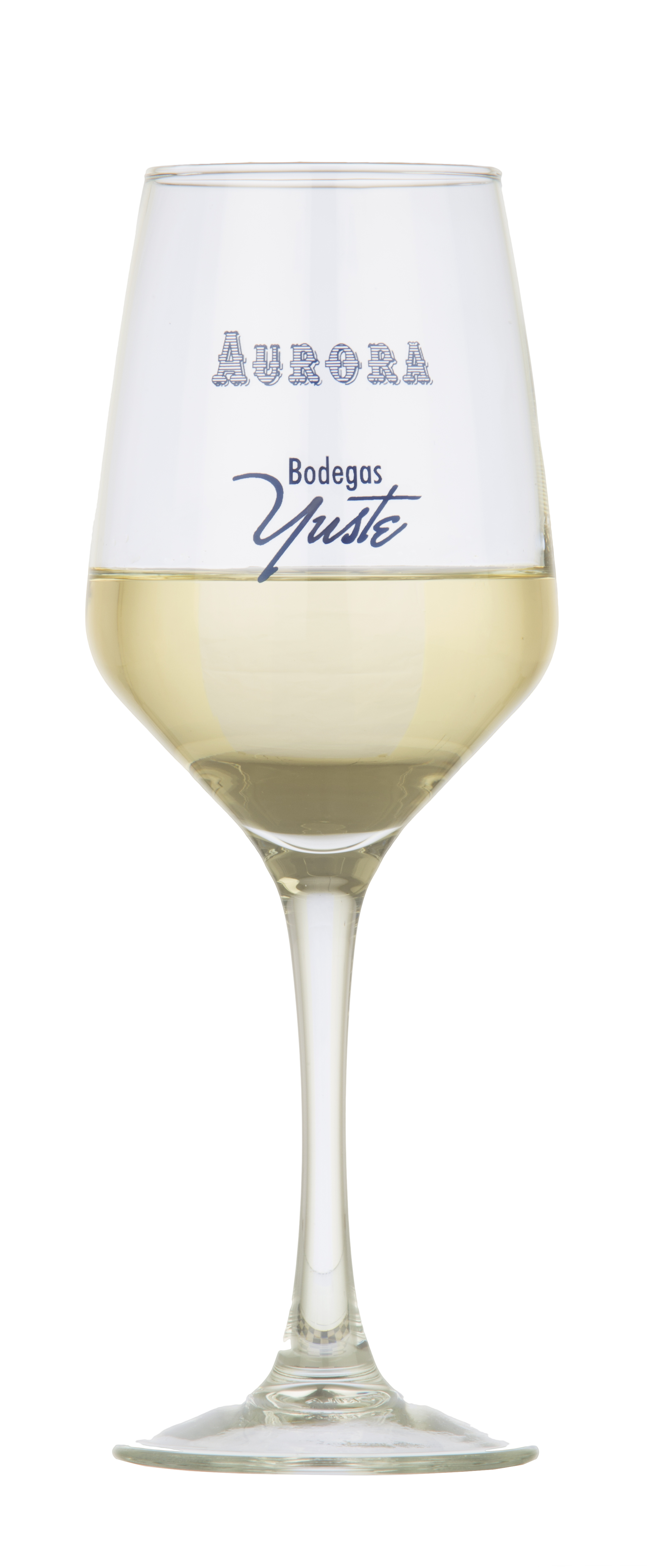 Copa de Manzanilla de Sanlúcar